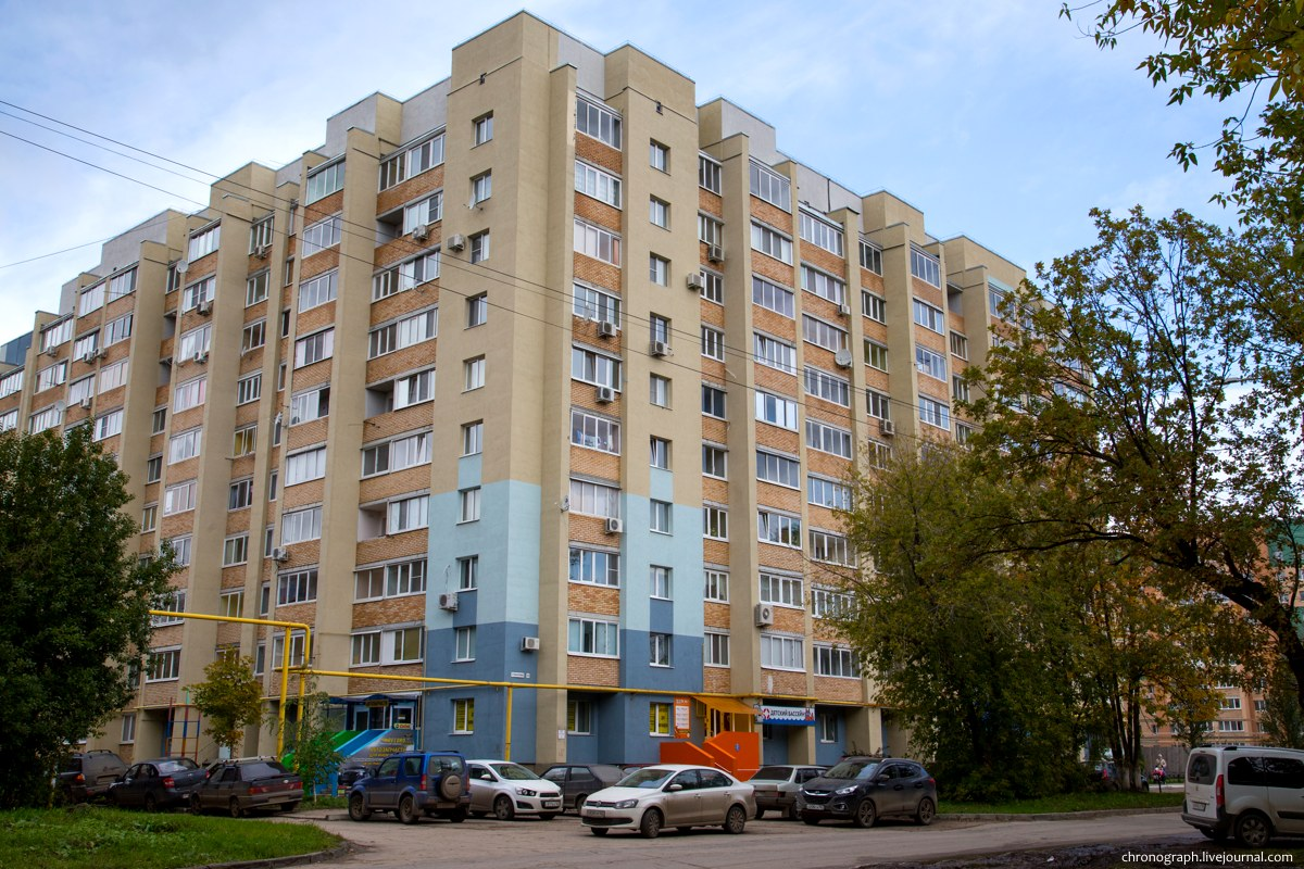 Посёлок Управленческий, Красноглинский район Самары, Россия.